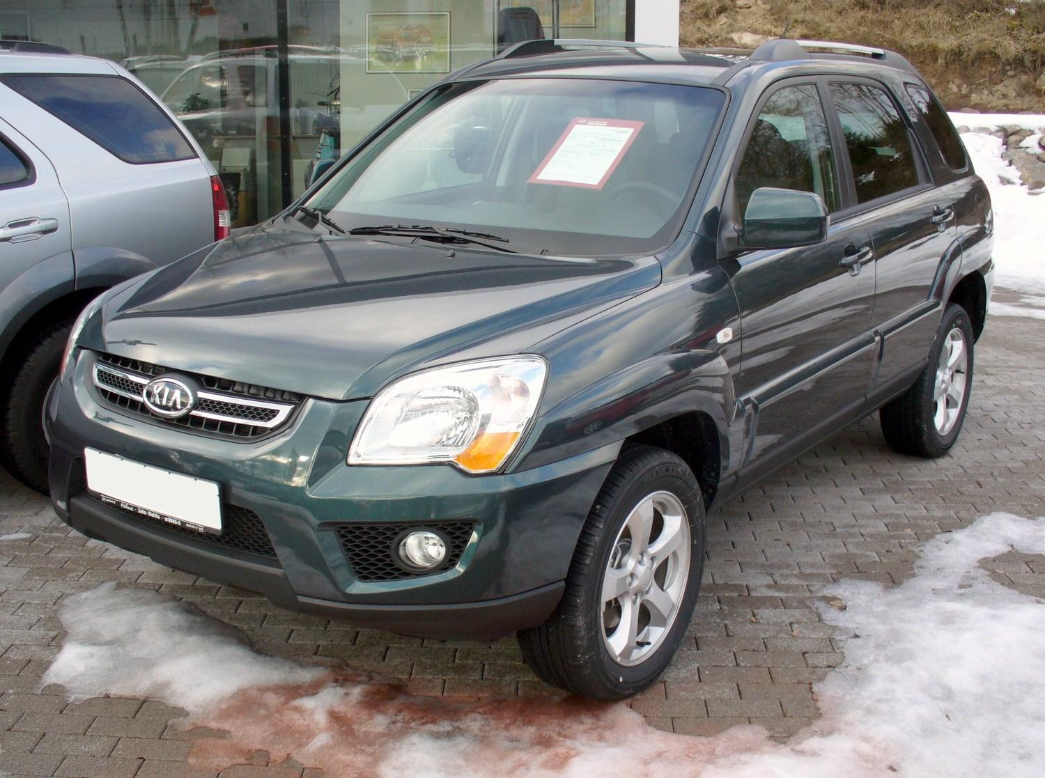 Kia Sportage